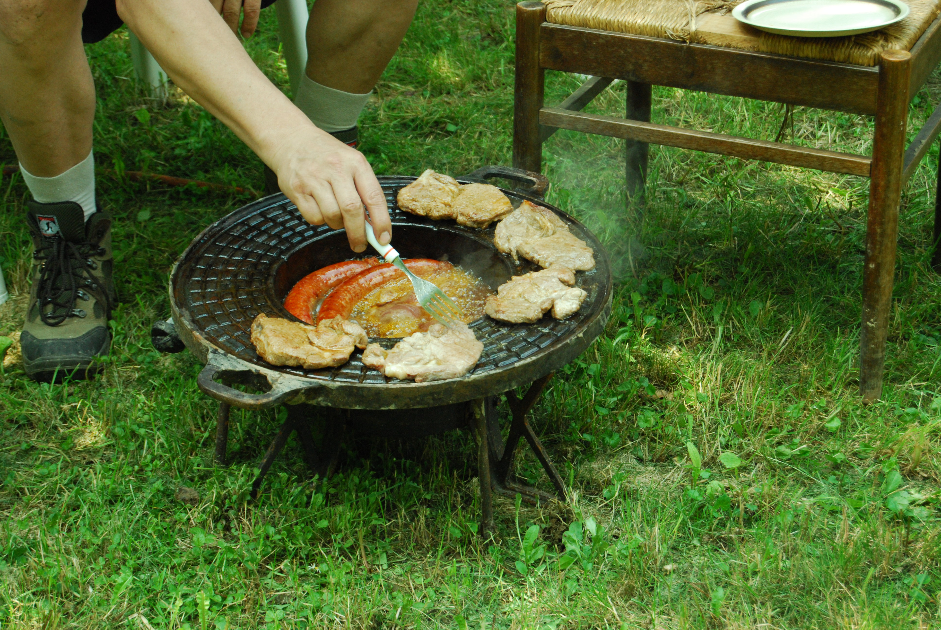 Agostyáni kolbász és tarja sütés